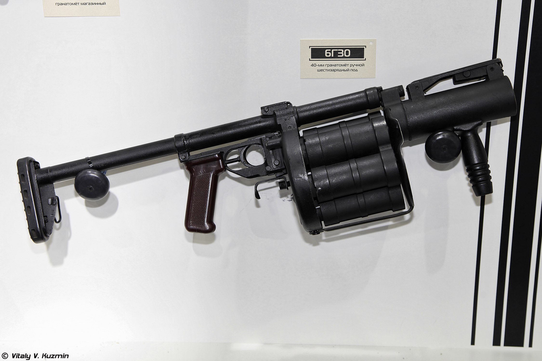 Гранатомет 6Г30 (6G30 grenade launcher)